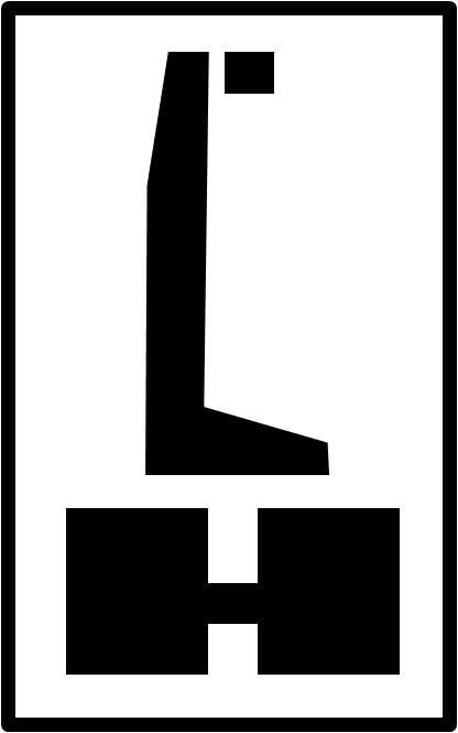 Logo HOELZL SEILBAHNBAU